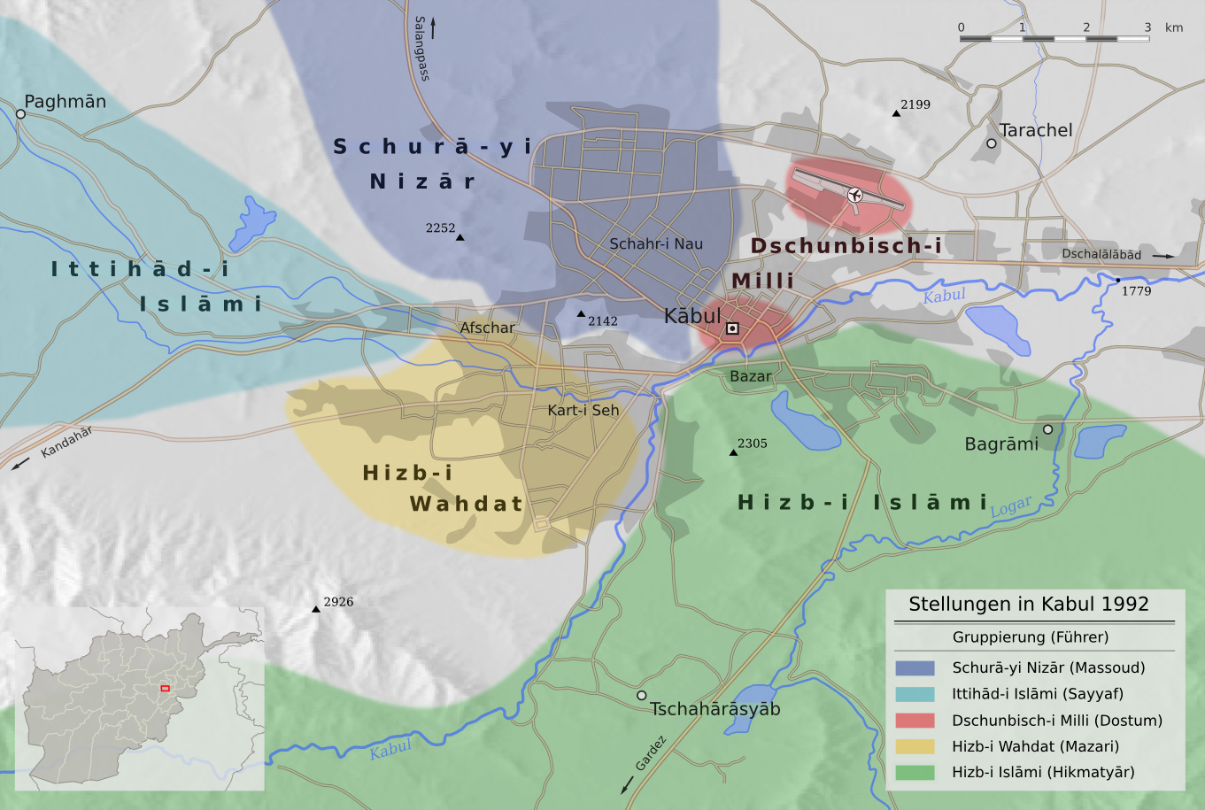 Stellungen der verschiedenen Gruppierungen in und um Kabul im Jahr 1992